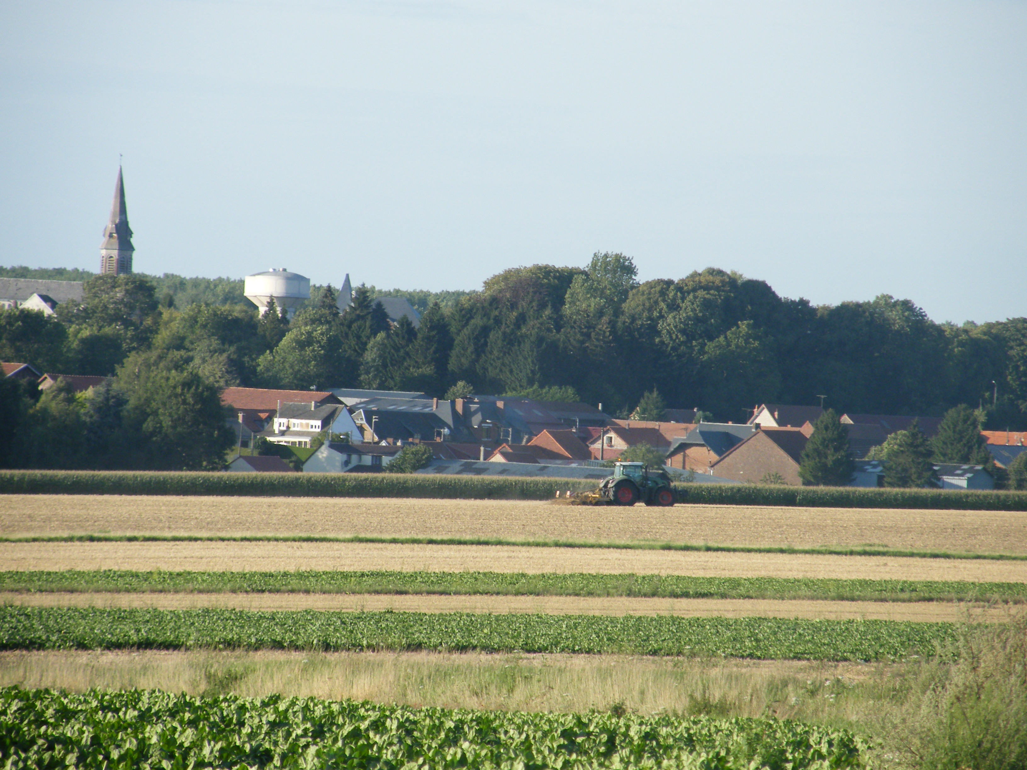 Village de Metz-en-Couture (Pas-de-Calais, France) vu des champs.